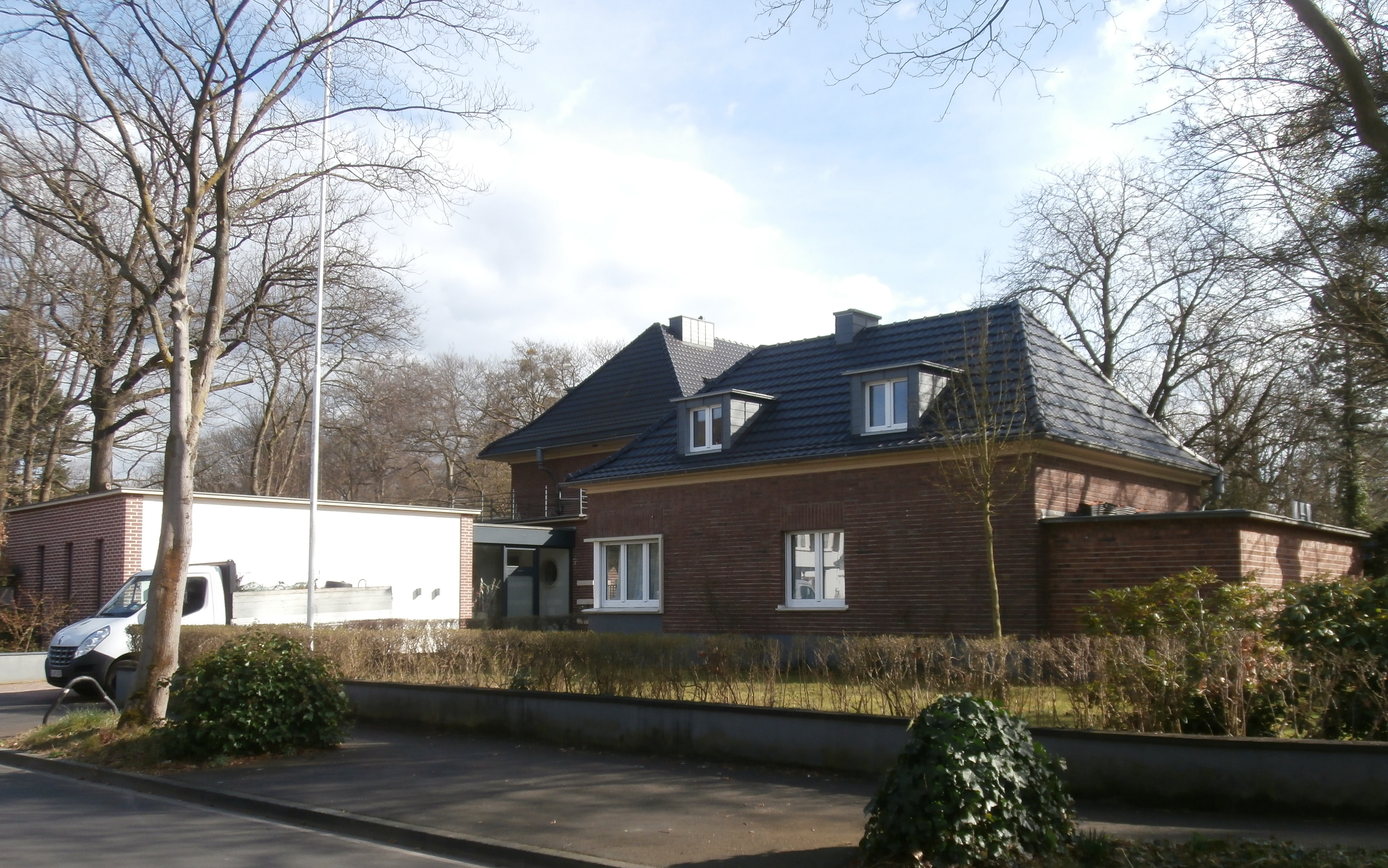 Ehemalige Residenz der Botschaft von Norwegen, Tannenallee 16, Rüngsdorf, Bad Godesberg: Ansicht von der Tannenallee